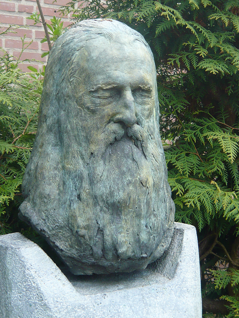 Kopf Moondog nach Totenmaske